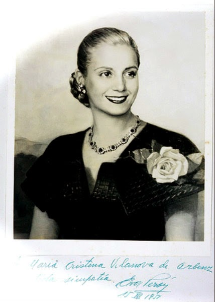 Fotografía de la Excelentísima y Dignísima Señora María Eva Duarte de Perón, primera dama y Jefa Espiritual de la Nación Argentina (1946-1952), a la Excelentísima y Dignísima Señora María Cristina Vilanova Castro de Árbenz, primera dama de la Revolución de la República de Guatemala. Texto: "Para María Cristina Vilanova de Árbenz" "Con simpatía" "Firma de Eva Perón" 15-4-1951